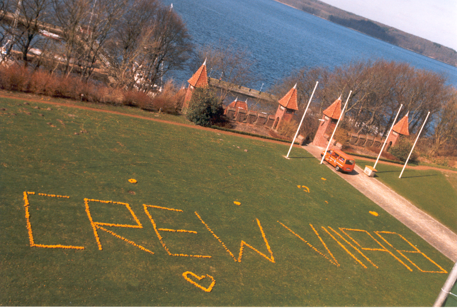 Krokusse auf der Admiralswiese vor der Marineschule Mürwik. Erinnerung an die Crew VII/98.